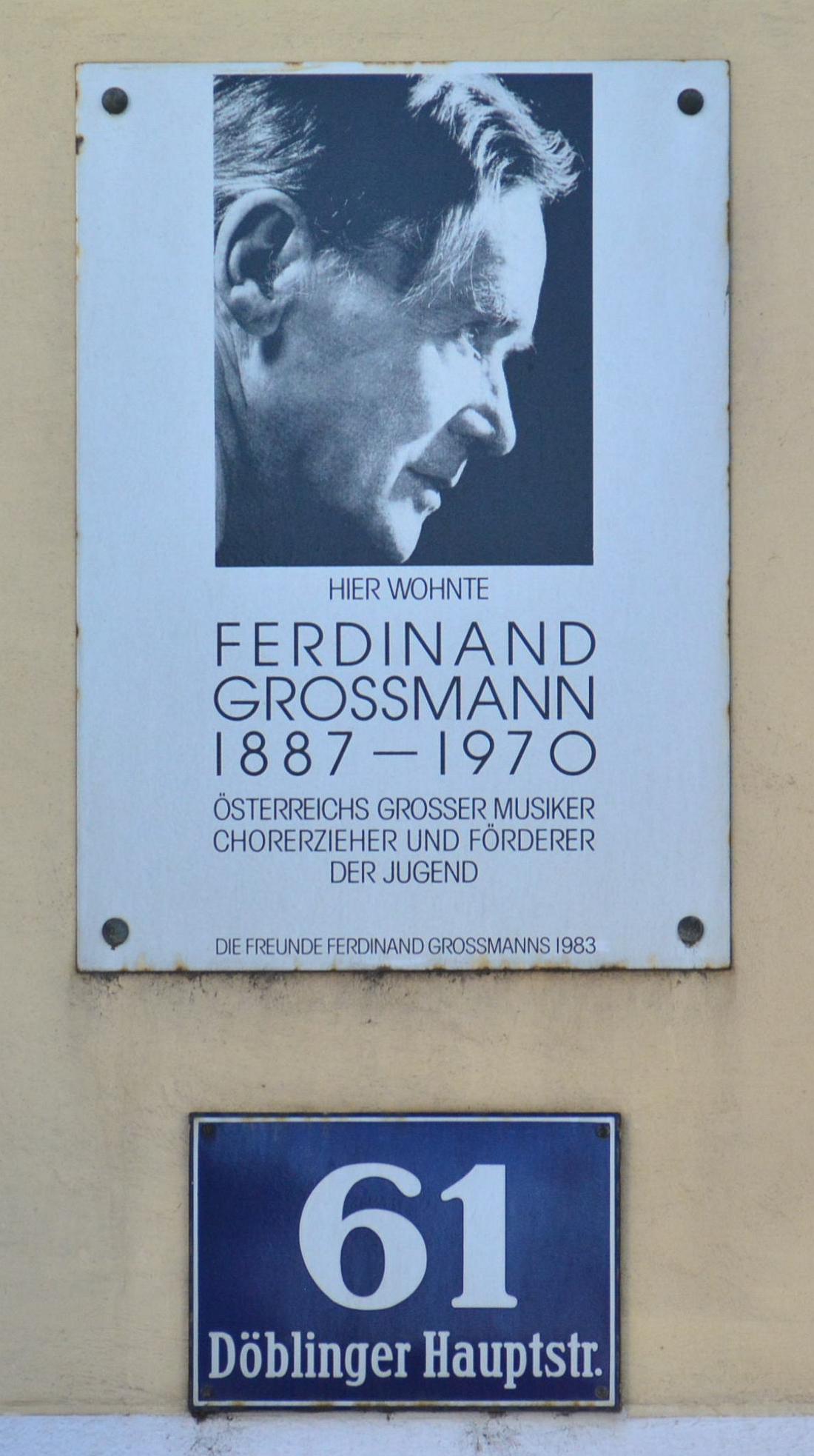 Gedenktafel für Ferdinand Grossmann (Wien, Döblinger Hauptstraße 61)